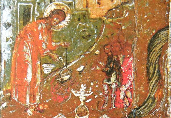 Св. Леонтий научает детей. Клеймо иконы «Леонтий Ростовский с житием в 24 клеймах». Ок. 1677 г. 100×78 см. Муромский историко-художественный музей, Муром, Россия. Инв. М-6674.